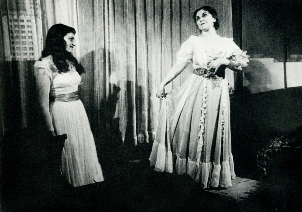 Tennessee Williams, Steklena menažerija, Mestno gledališče v Ljubljani. Na fotografiji: Mira Danilova (Amanda Wingfieldova), Judita Hahn-Kreft (Laura Wingfieldova).